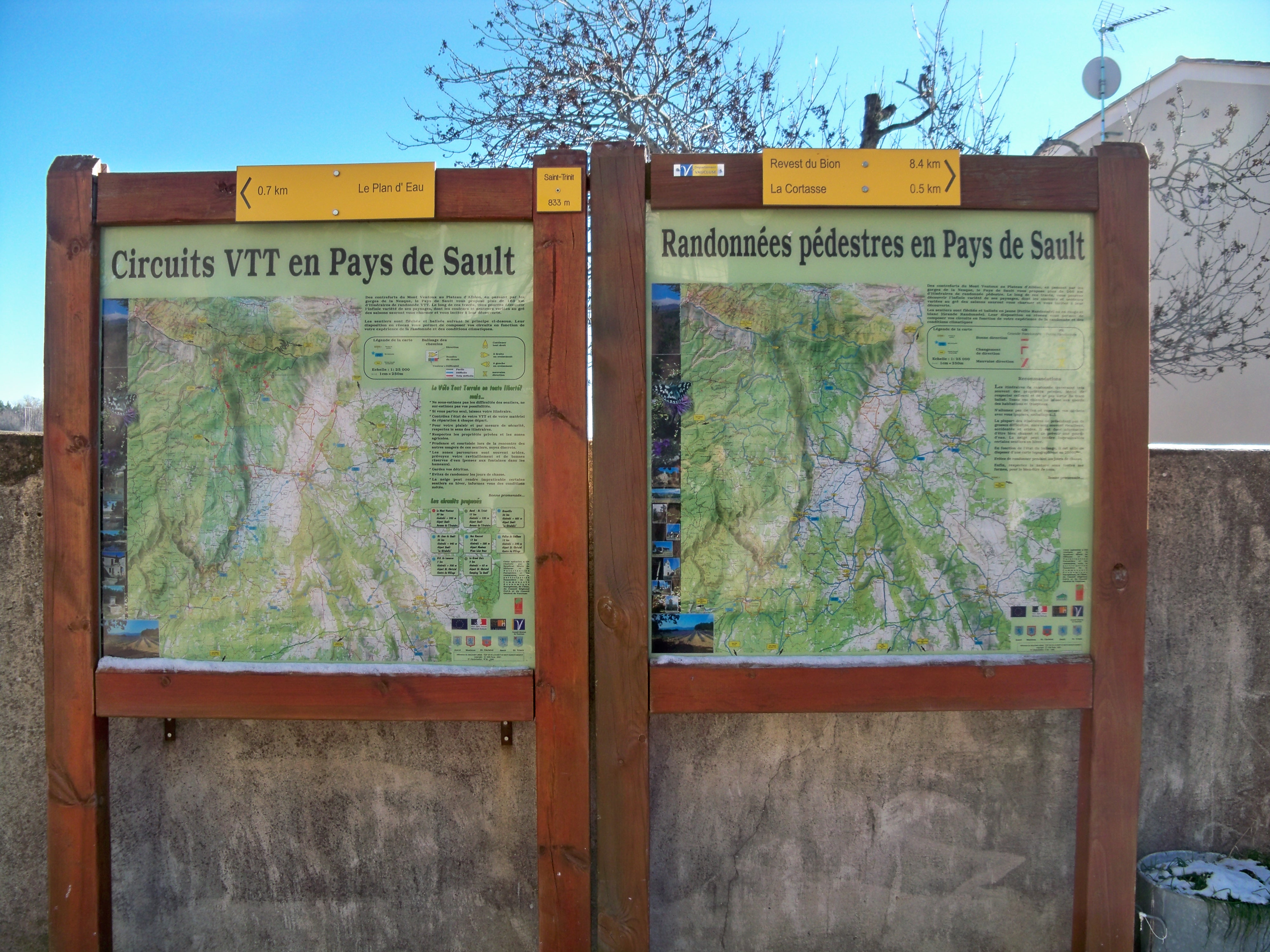 Carte des randonnées pédestres en Vaucluse, France